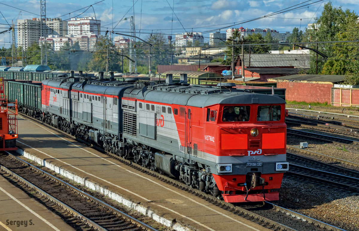 С хххх по 09.2012 г. в депо Комсомольск-на-Амуре 09.2012 — передан в депо Новая Чара 12.2014 — передан в депо Курск-Сортировочный 01.2016 — передан в депо Новомосковск